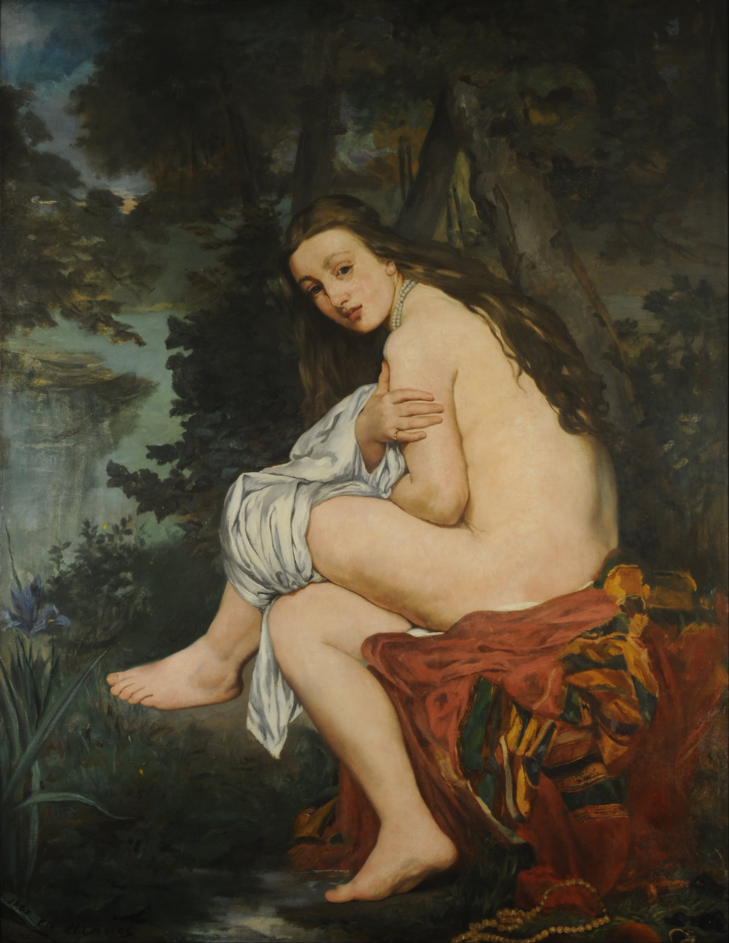 حوری شگفت‌زده اثر ادوار مانه، سال ۱۸۶۱ (میلادی) که در موزه ملی هنرهای زیبا، بوئنوس آیرس، آرژانتین نگهداری می‌شود.